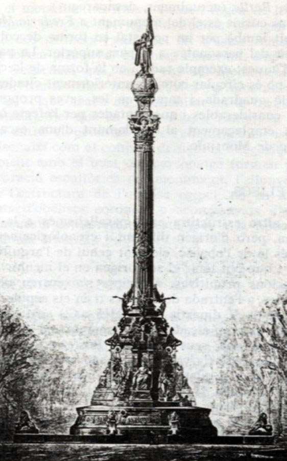 Monumento a Colón, boceto original de Gaietà Buïgas.